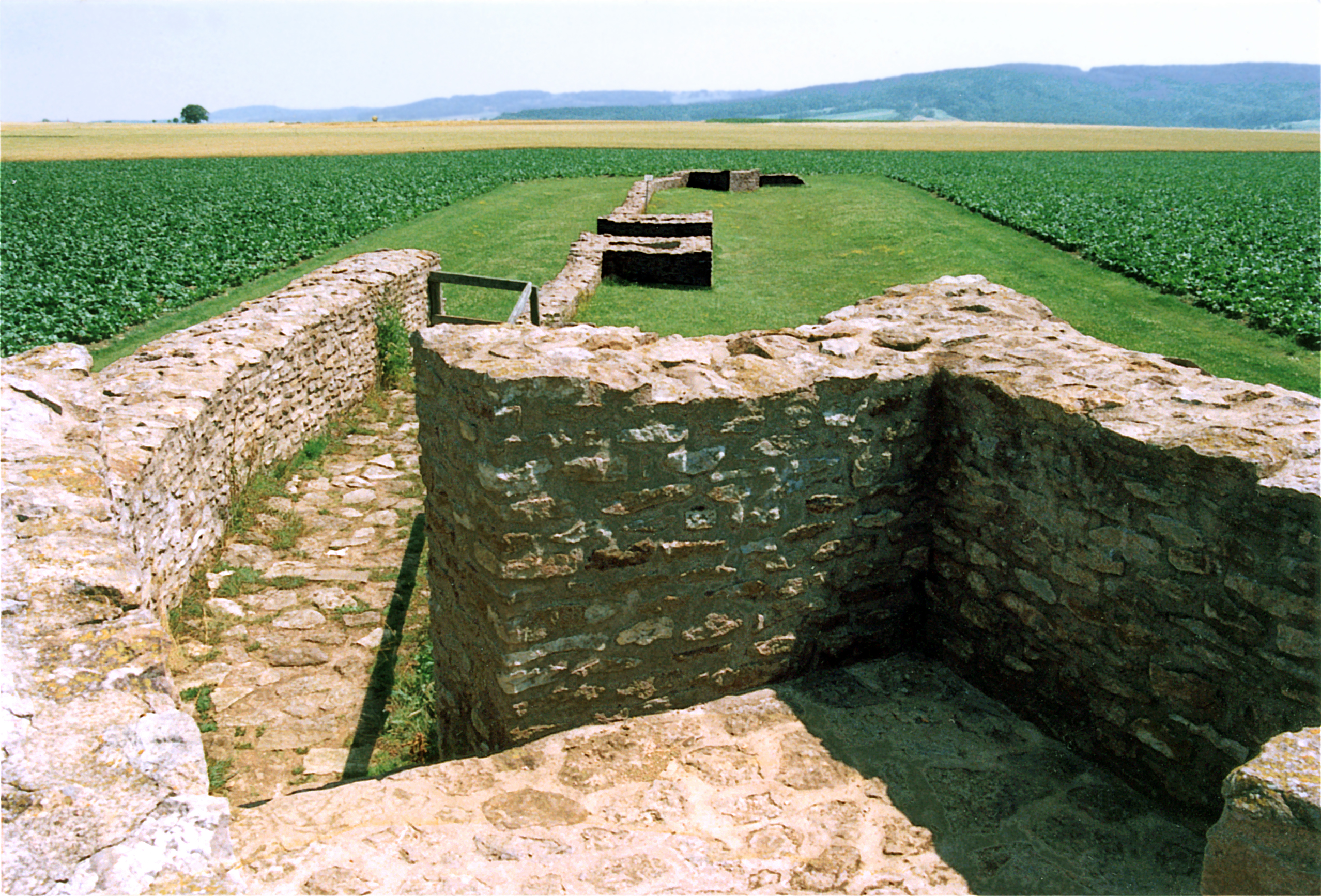 Teilrekonstruierte Praetorialfront am Limeskastell Sablonetum bei Ellingen in Bayern.